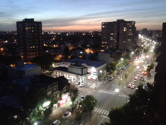 Ciudad De Beccar Iluminada